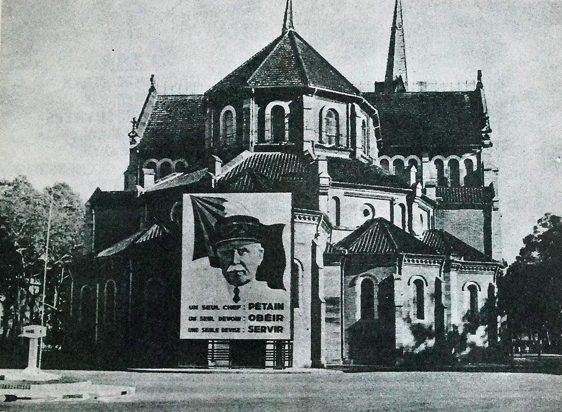 Propagande en faveur du Maréchal Pétain à l'arrière de la cathédrale. Affiche de 6m * 8 mètres